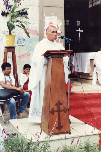 El Arzobispo de Guatemala desde el Seminario Mayor de la Asunción en 1986